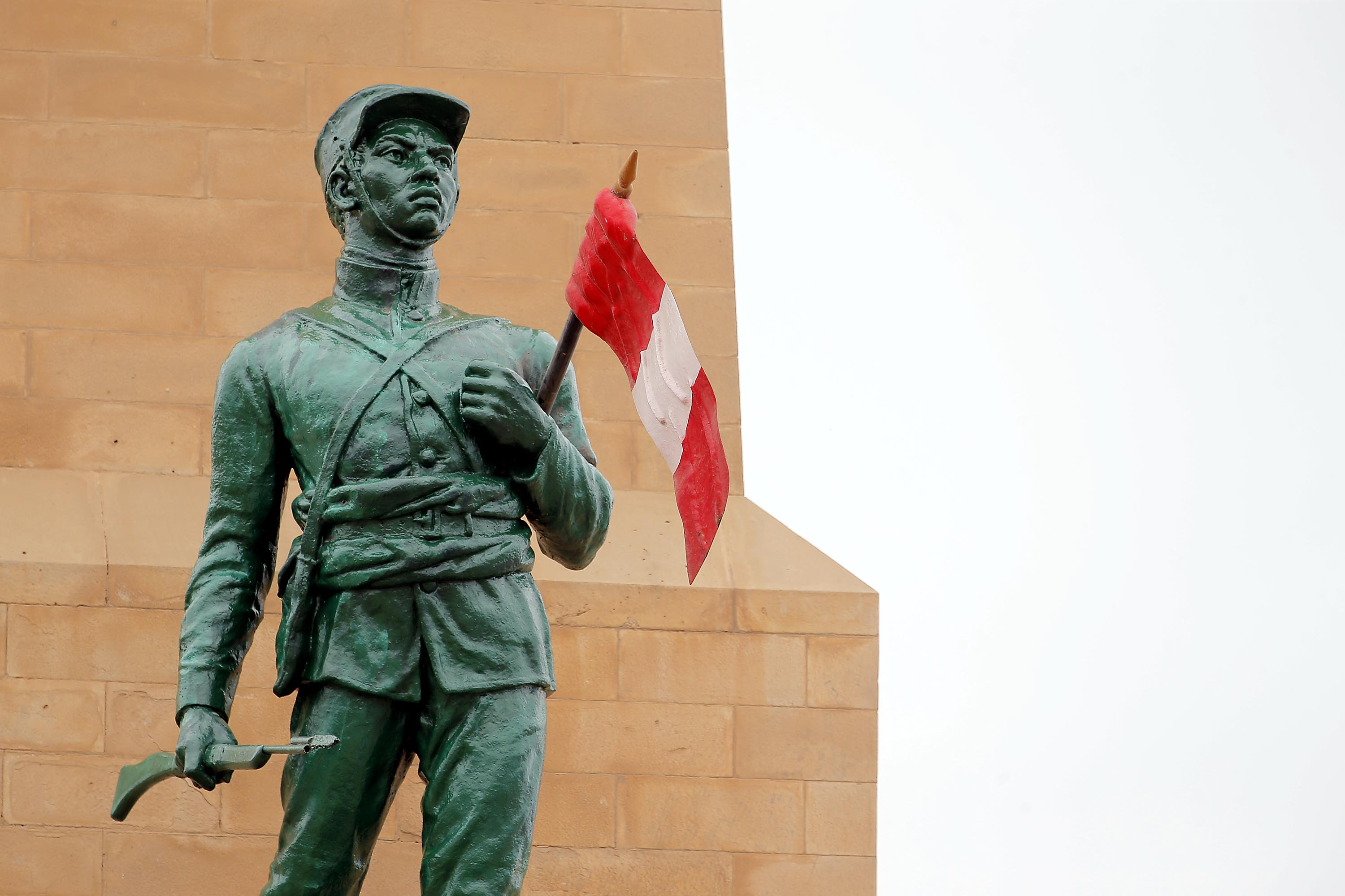 El ministro de Defensa, Pedro Cateriano Bellido, presidió la ceremonia esta mañana por el 134º aniversario de la Batalla de San Juan ocurrida en el Morro Solar en el distrito de Chorrillos, durante la Guerra del Pacífico.